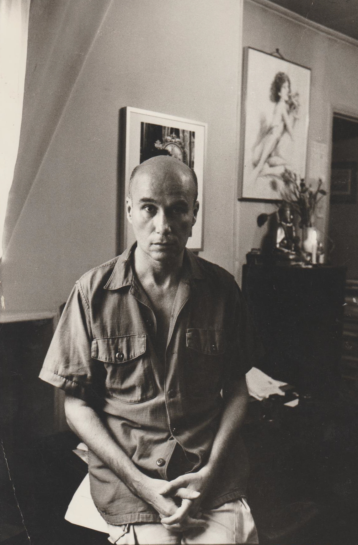 Portrait de Gabriel Matzneff par Florence Kirastinnicos, rue des Ursulines, Paris.